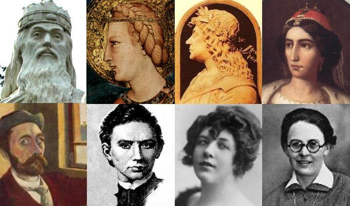 Magyarok. A fájlt először a magyar nyelvű Wikipédiára töltötték fel, a következő leírással: Montázs, amelyet a következő szabad licencű képek felhasználásával készítettem. --Adapa 2007. február 21., 10:07 (CET) Image:Hng2_2.jpg Image:Simone_Martini_046.jpg Image:Zrinyi_ilona.jpg Kép:Fedák Sári..jpg Image:Sara Salkahazi.jpg Adapa képe módosítva; az ezresről kivágott helyett másik Mátyás király került bele. – Alensha 8px üzi m 2007. november 27., 03:31 (CET)